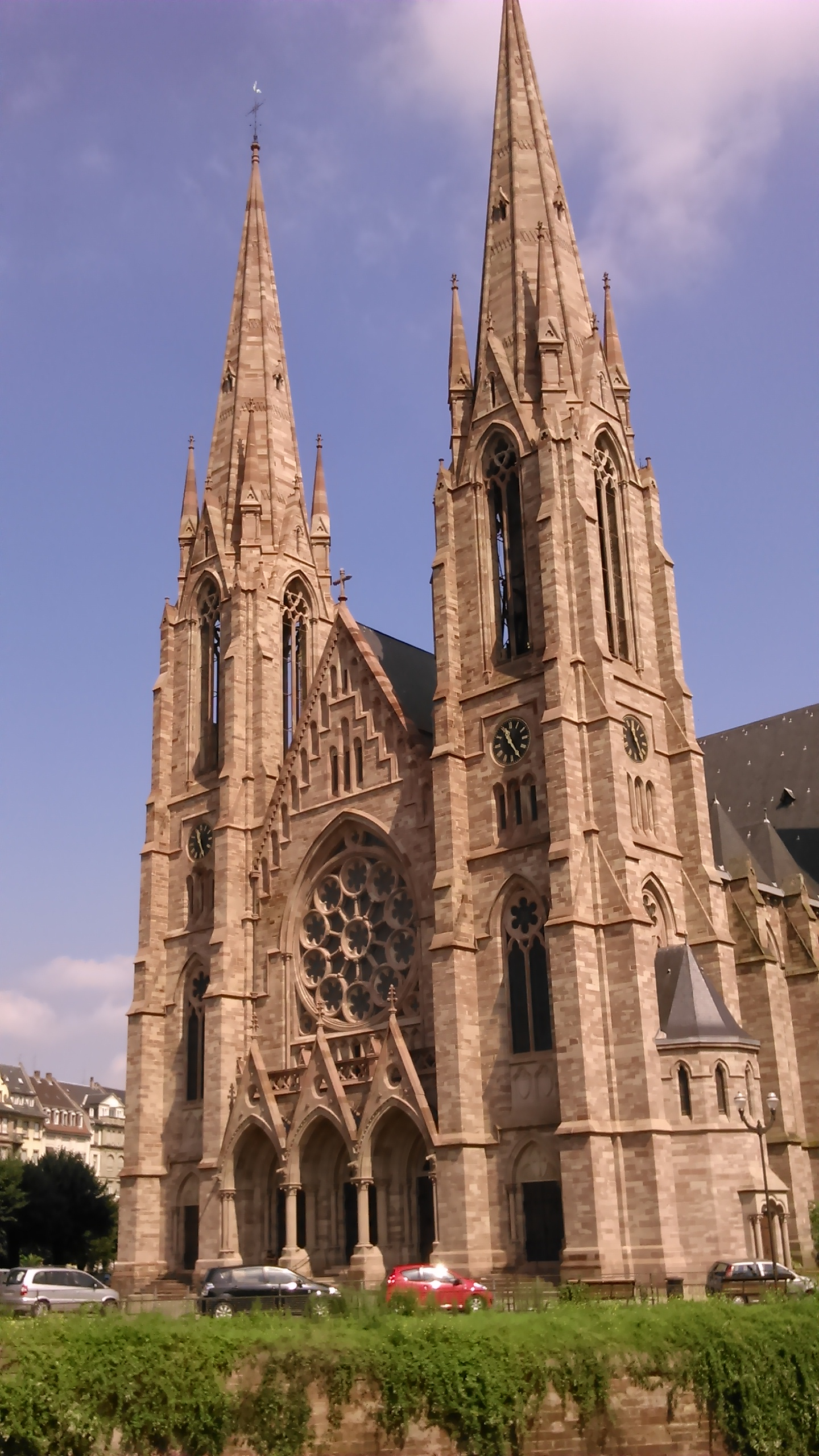 l'église Saint Paul de Strasbourg après restauration.